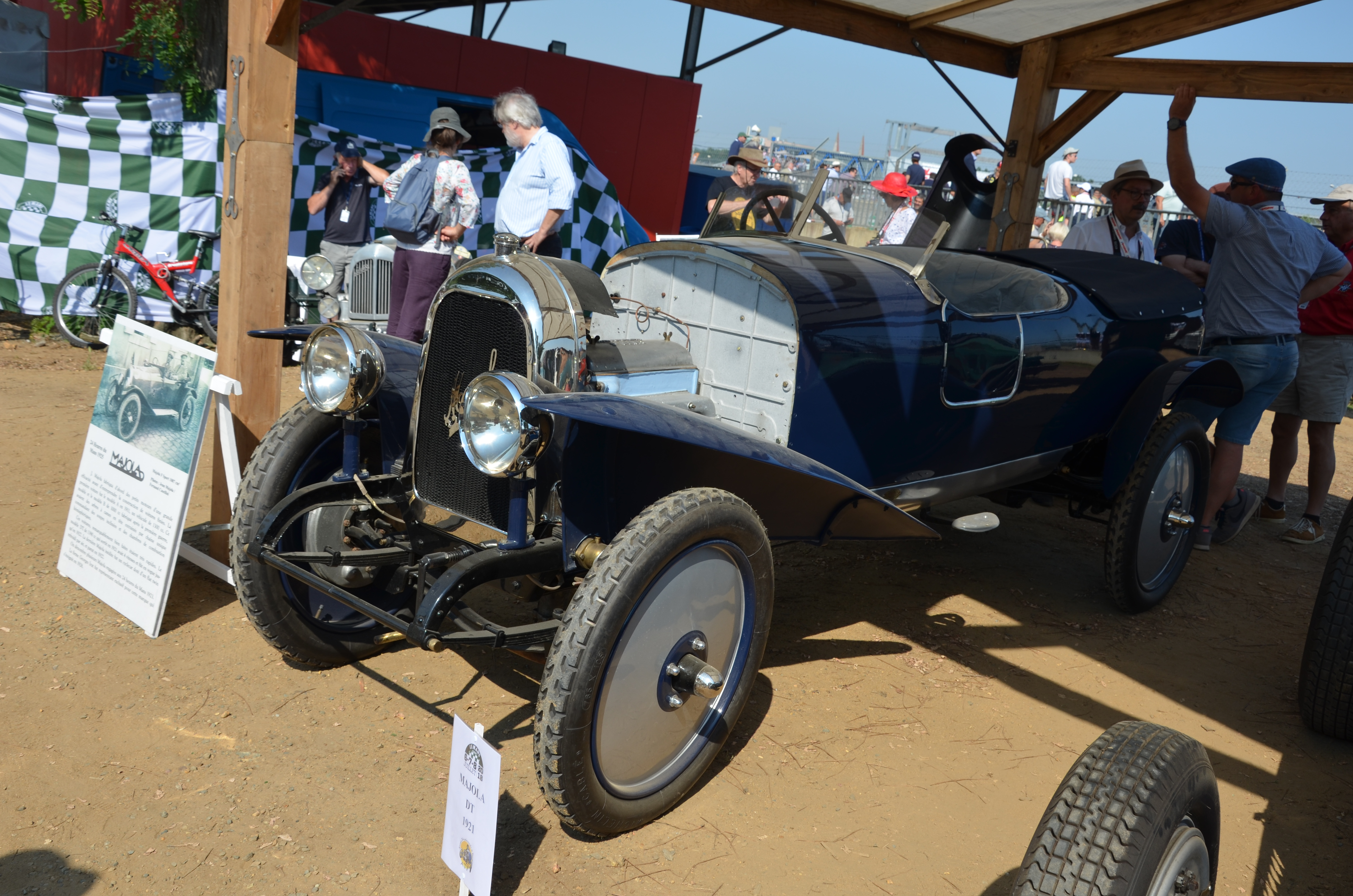 Majola DT 1921 at the 2018 Le Mans Classic